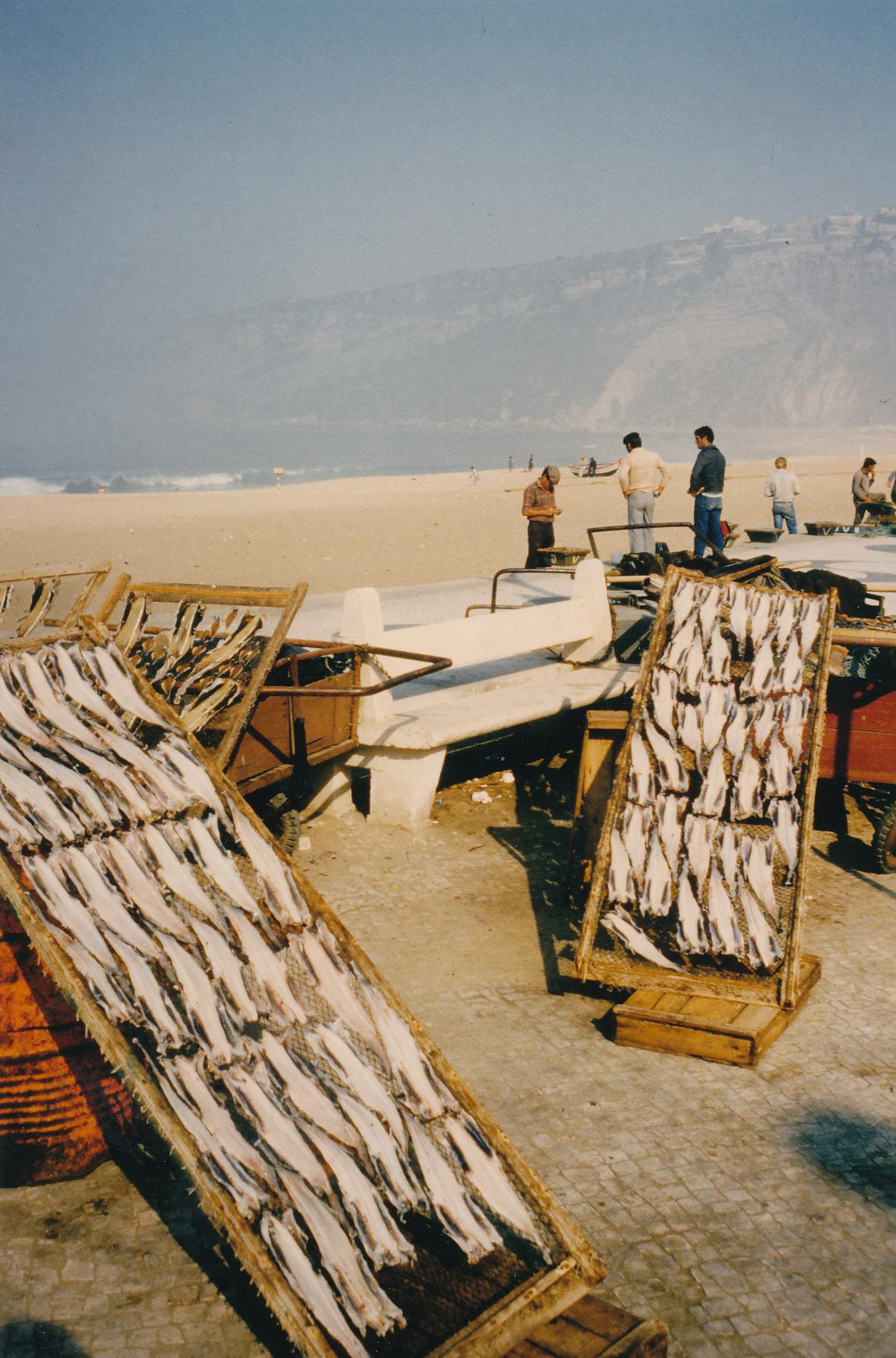 Dörrfisch am Strand von Nazaré Datum: 09/1985 Urheber: Michael Pfeiffer Quelle: privates Fotoalbum des Urhebers